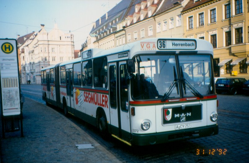 Augsburg, Bus 3372, MAN SG 240 H, am Ulrichsplatz